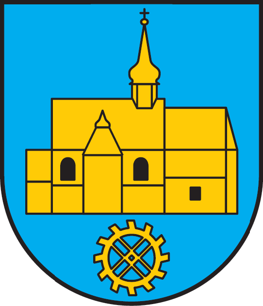 Herb gminy Chrostkowo